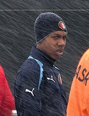 Jean-Paul Boëtius